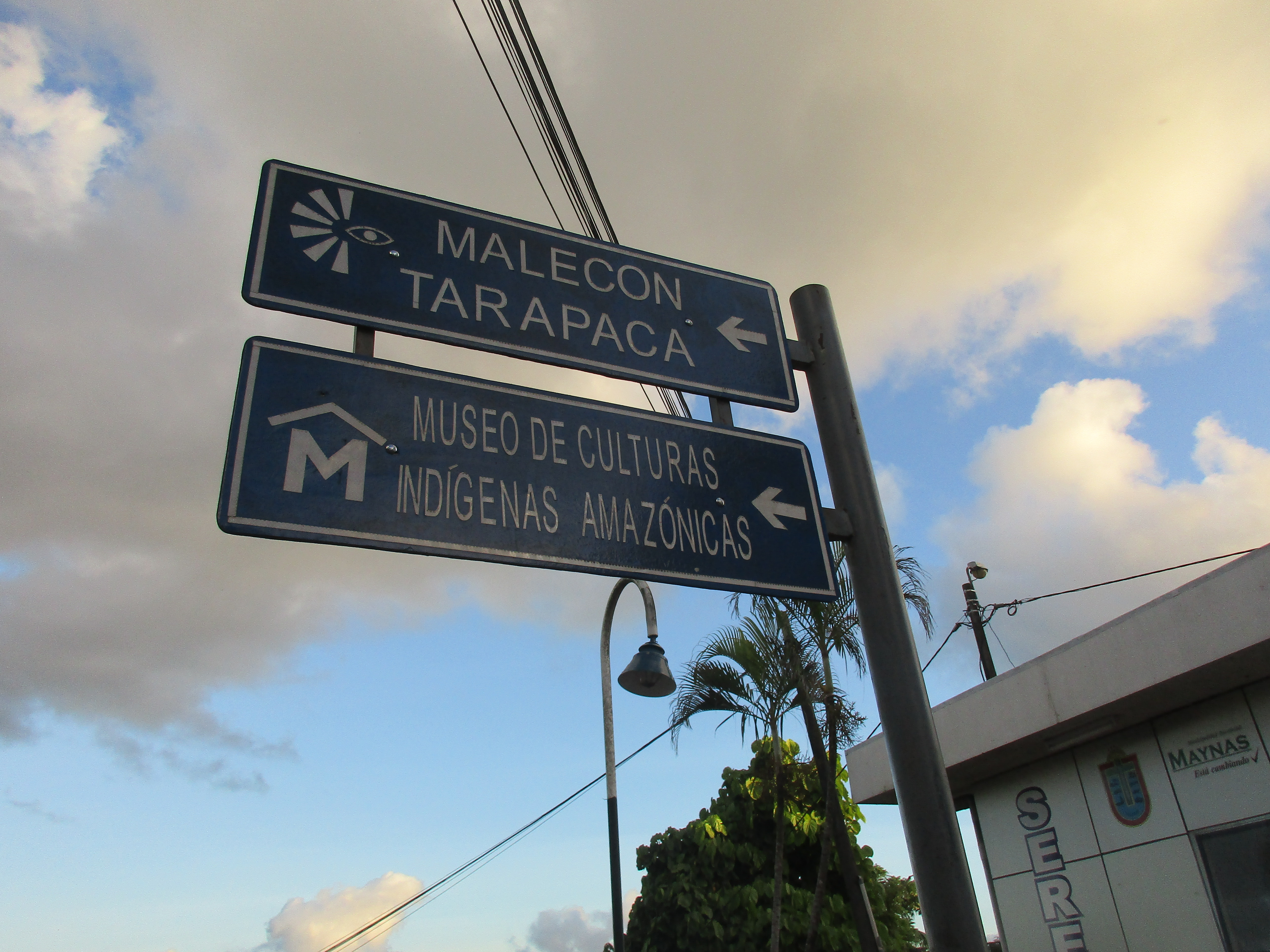 Letreros de indicaciones en el centro histórico de Iquitos, Perú, indicando la dirección del Malecón Tarapacá y el Museo de Culturas Indígenas Amazónicas.